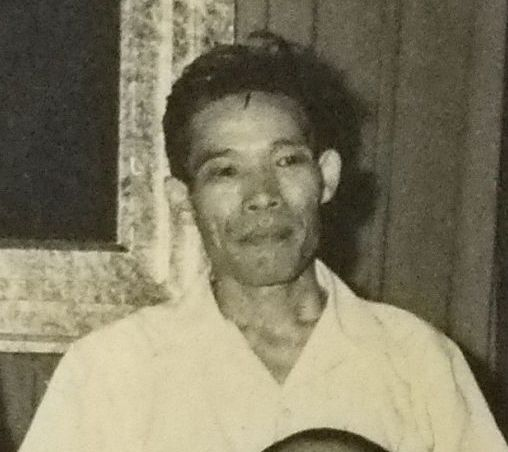 春日正一